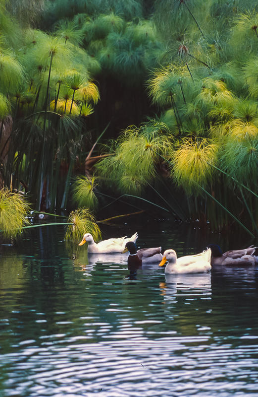 Aprile 2000 Siracusa, Fonte Ciane